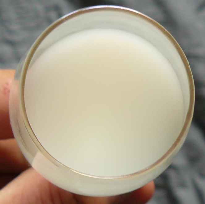 Fuerteventura - oryginalny, lokalny likier z koziego mleka.